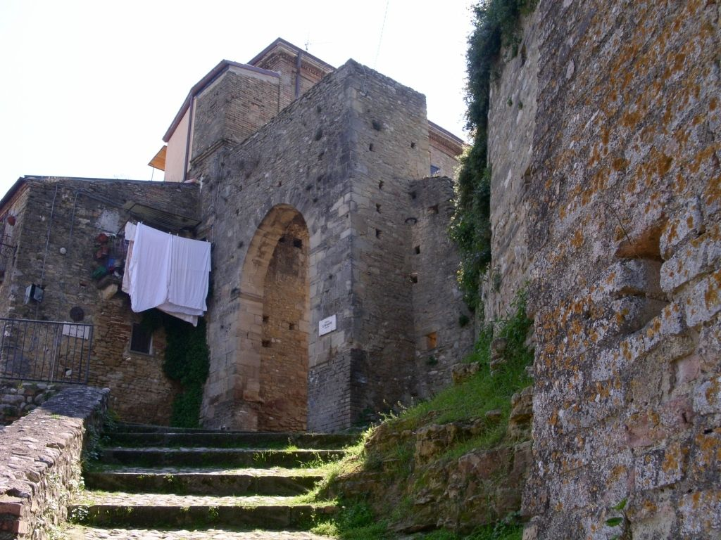 Fotografia di Porta San Biagio dall'esterno. Lanciano (CH), 7 aprile 2007. Foto scattata da me.